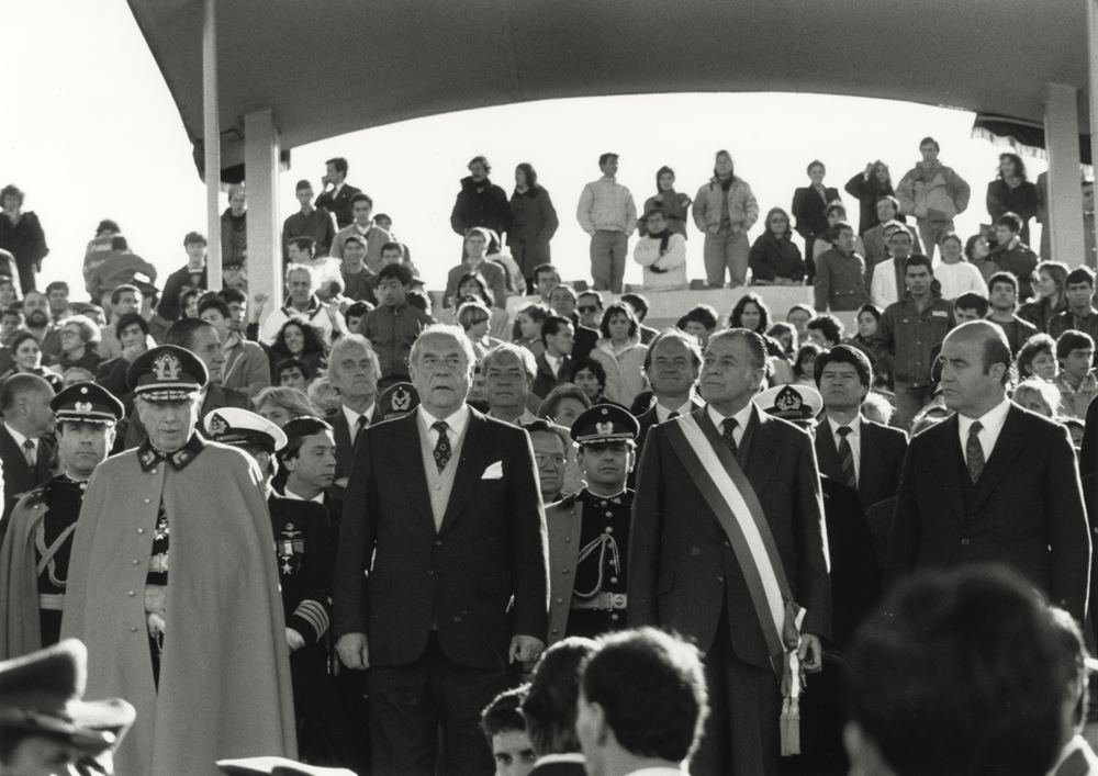 Sin fecha. Pdte. Aylwin presenciando la parada militar, acompañado del senador Gabriel Valdés, Patricio Rojas (Ministro de Defensa) y el Gral. Pinochet